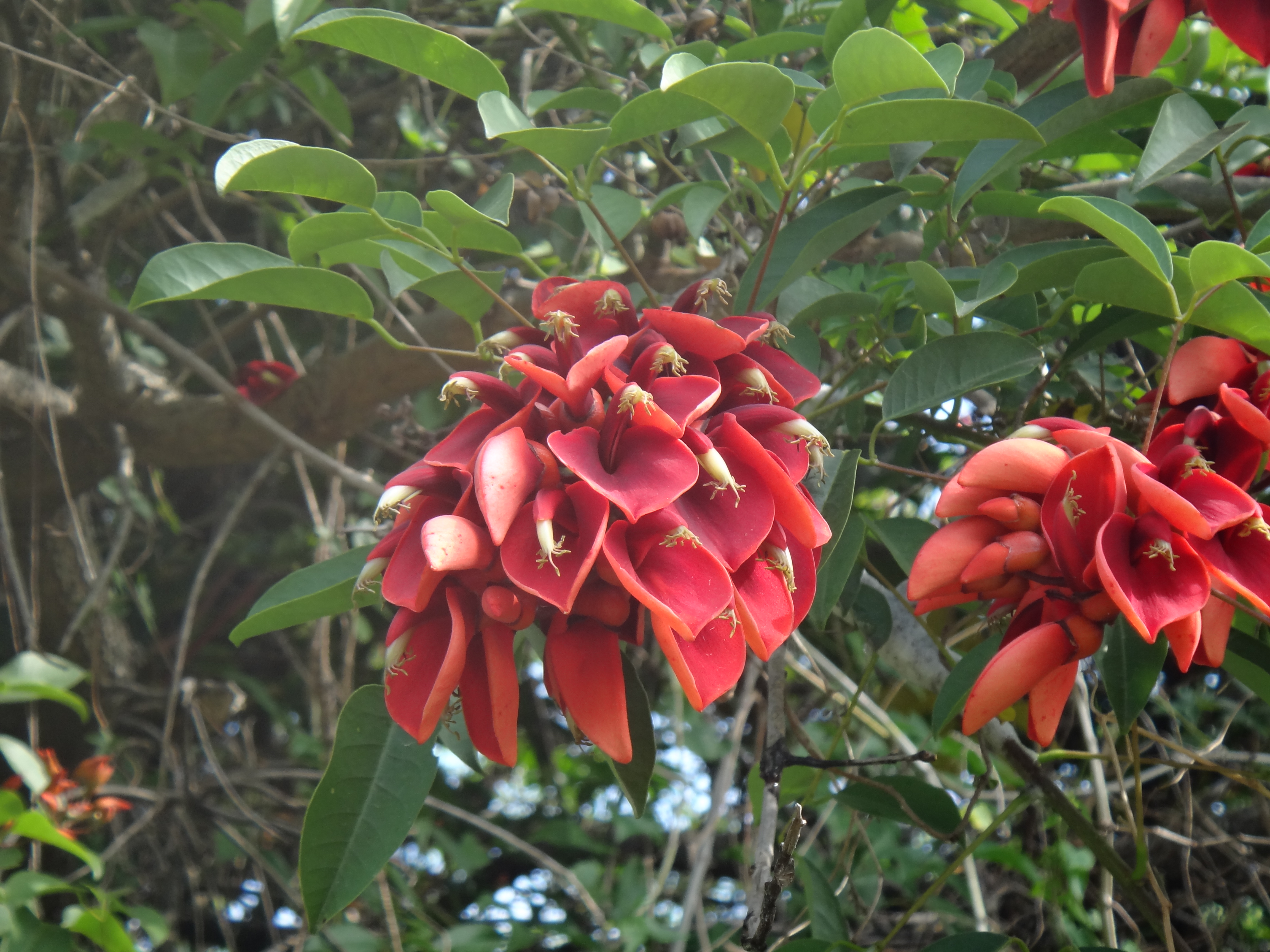 flores del ceibo en la reserva ecológica Costanera Sur de la ciudad de Buenos Aires , Argentina.